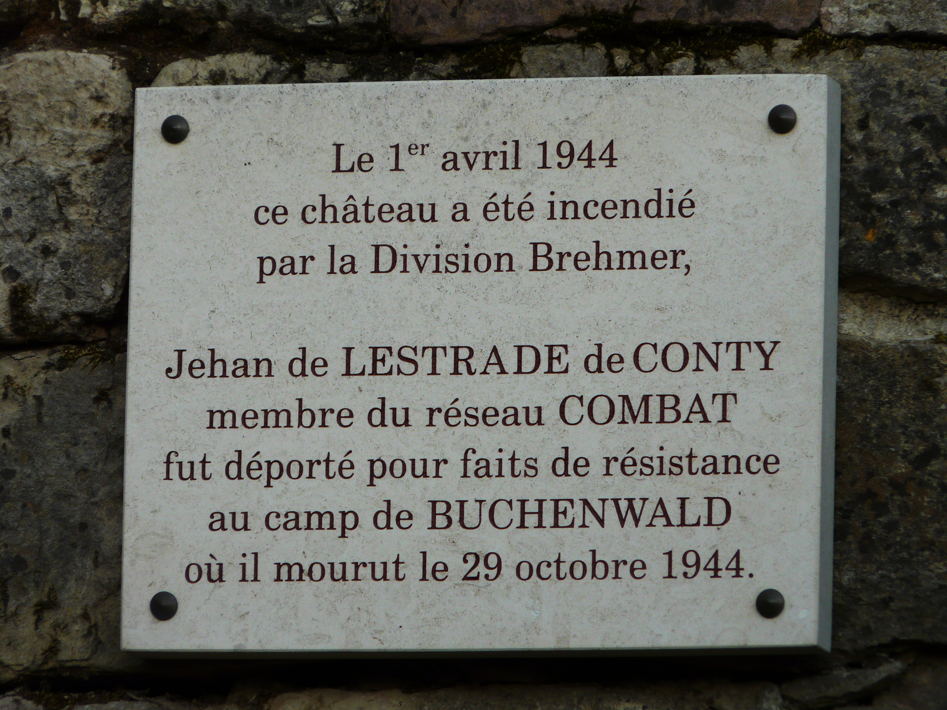 Plaque apposée sur le mur du château de Badefols, Badefols-d'Ans, Dordogne, France